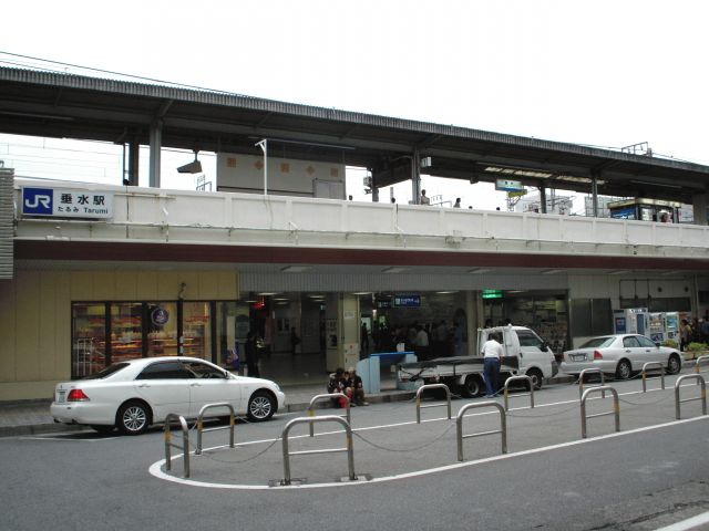 垂水駅